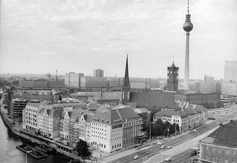 ADN-ZB Deutsche Demokratische Republik Januar 1987 4-87 750 Jahre Berlin Der historische Stadtkern Blickt man über die Dächer Berlins, bietet sich dem Betrachter ein eindrucksvolles Panorama. An der historischen Gründungsstätte Berlins geht bis zur 750-Jahr-Feier 1987 am Ufer der Spree ein architektonisch-städtebauliches Kleinod seiner Vollendung entgegen: das Nikolaiviertel. Etwa 1.500 Bürger fanden hier eine komfortable Heimstatt. Traditionelle Bauelementr der mittelalterlichen Stadtstruktur vereinen sich in diesem neuen Wohn- und Geschäftsensemble harmonisch mit der Baukunst der Gegenwart. Im Hintergrund der Fernsehturm, links davor das Rote Rathaus. Reporter: Settnik Copyright: ADN-Zentralbild